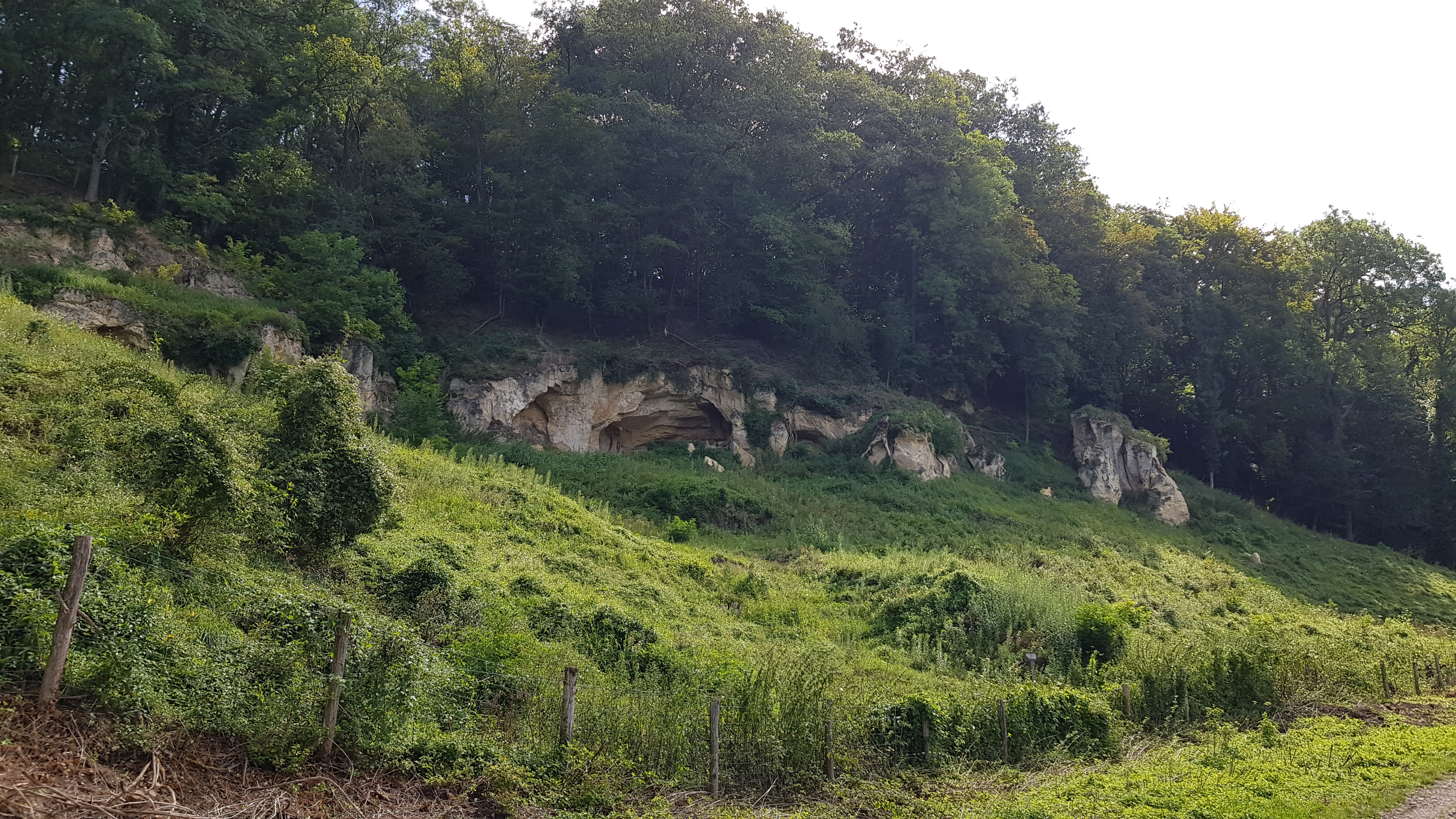 Mettenberggroeve I + II + III, Bemelen, Nederland